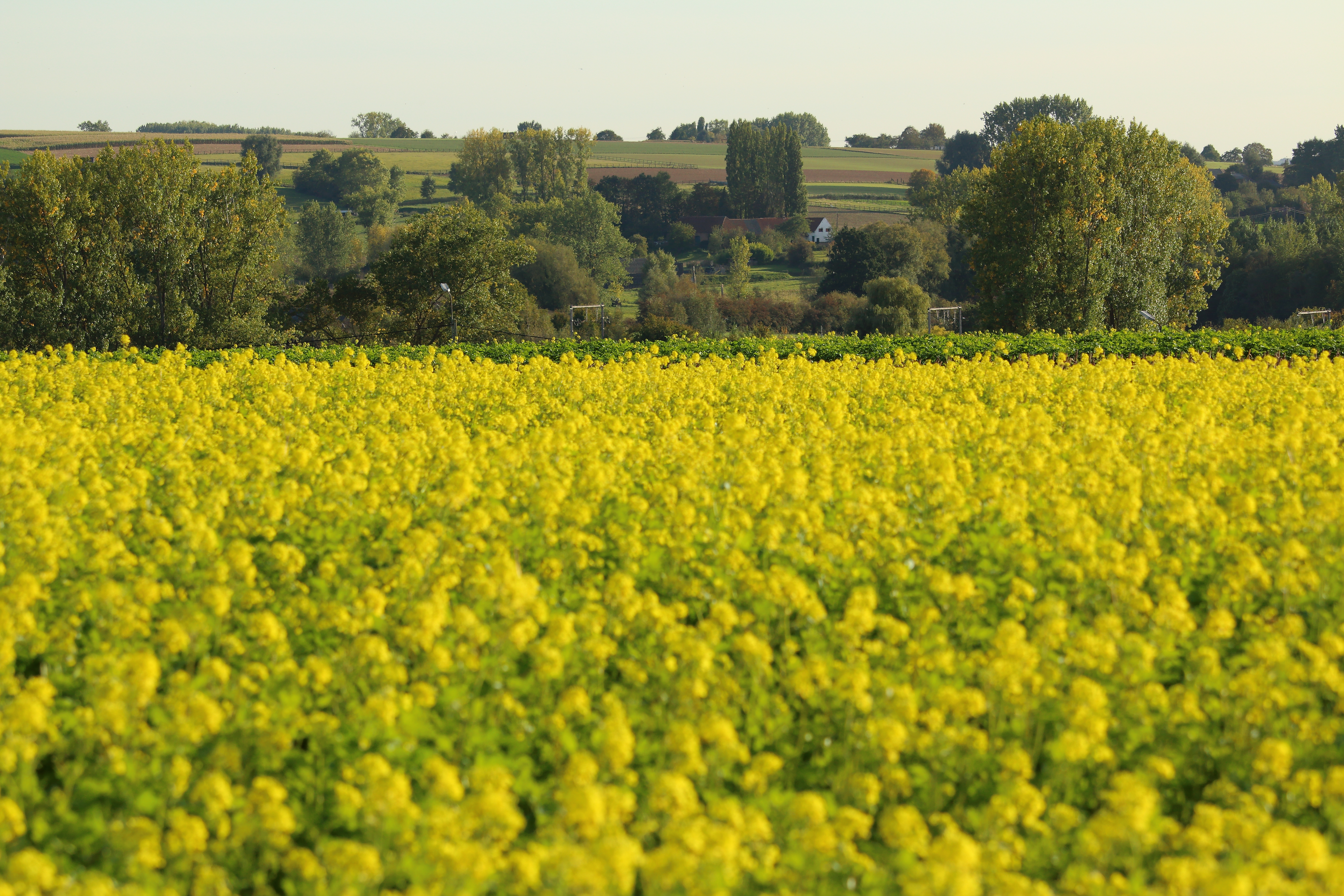 Vlaamse Ardennen, Zottegem, Vlaanderen, België